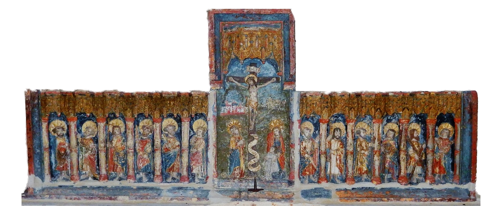 Retable dans l'église d'Attignéville (Vosges). Pierre peinte. Début 16e siècle . Classée MH